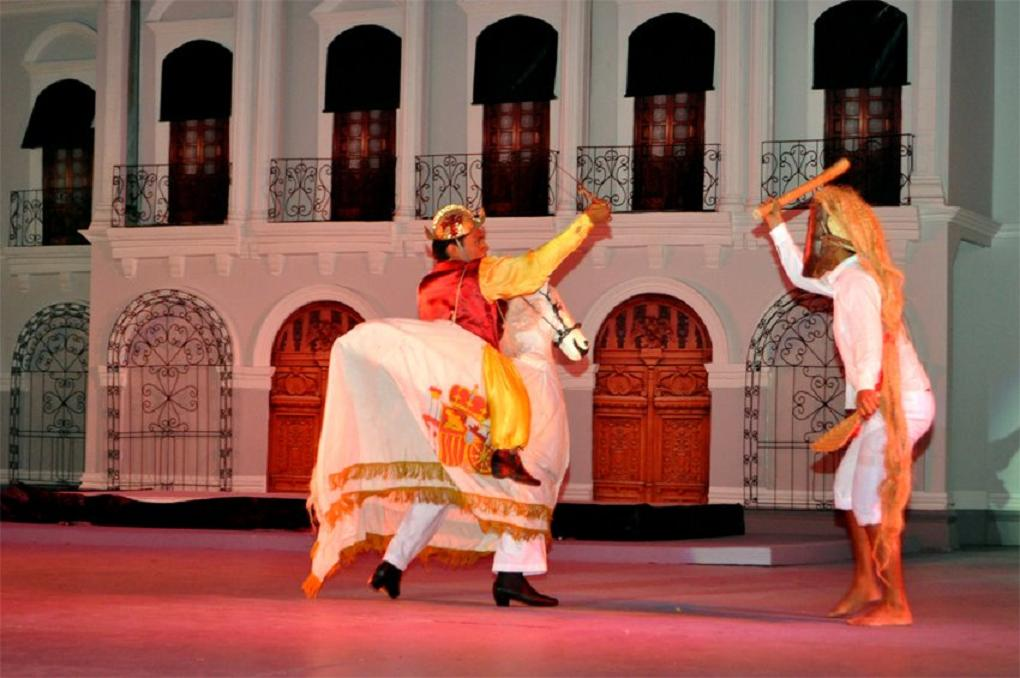 Indumentaria utilizada por los participantes en la danza del "Caballito blanco",, que se baila en la villa de Tamulté de las Sabanas, municipio de Centro. Una de las danzas más importantes y autóctonas del estado de Tabasco, México.